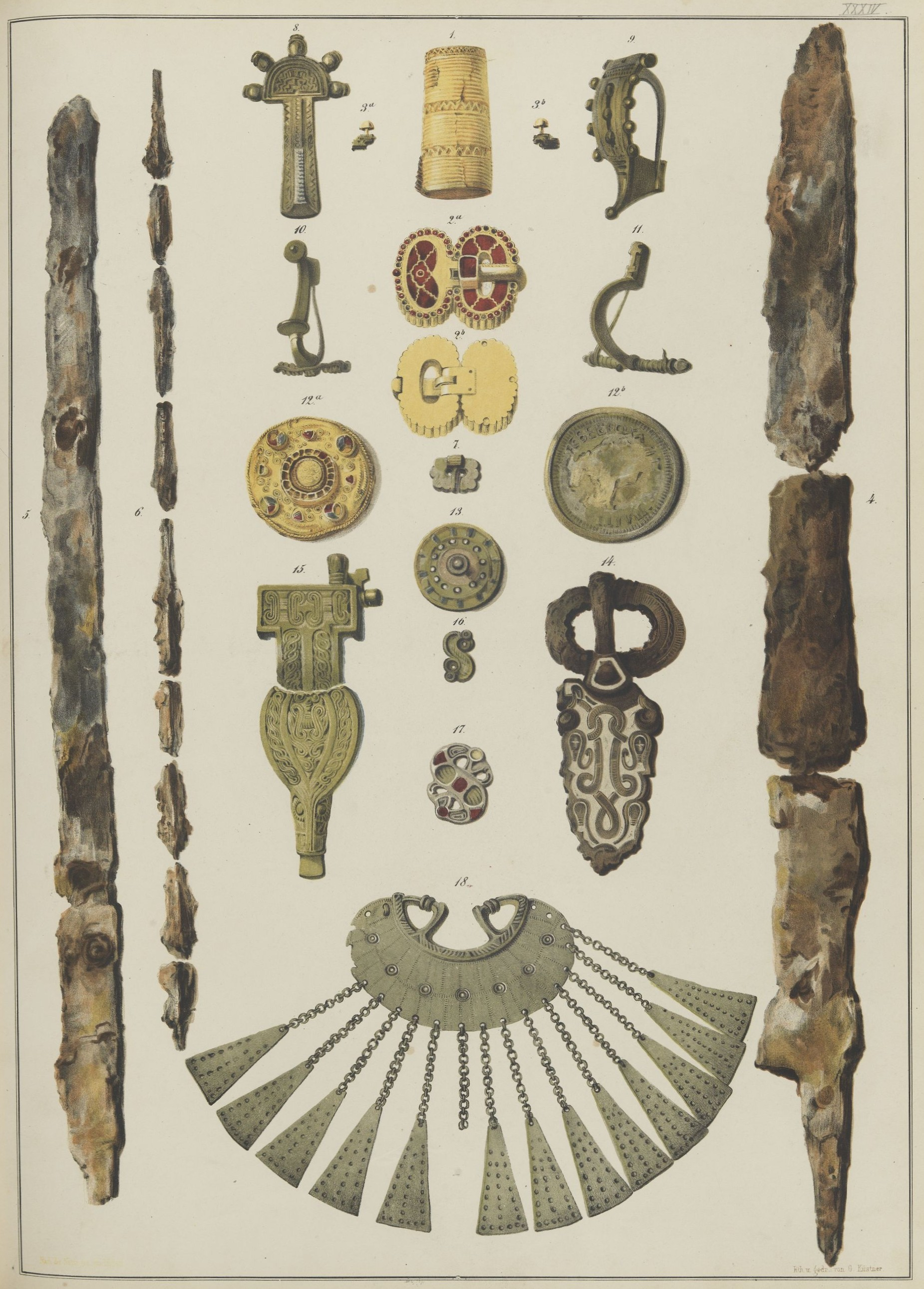 Zeichnung archäologischer Funde in der Mitte des 19. Jahrhunderts aus Württemberg